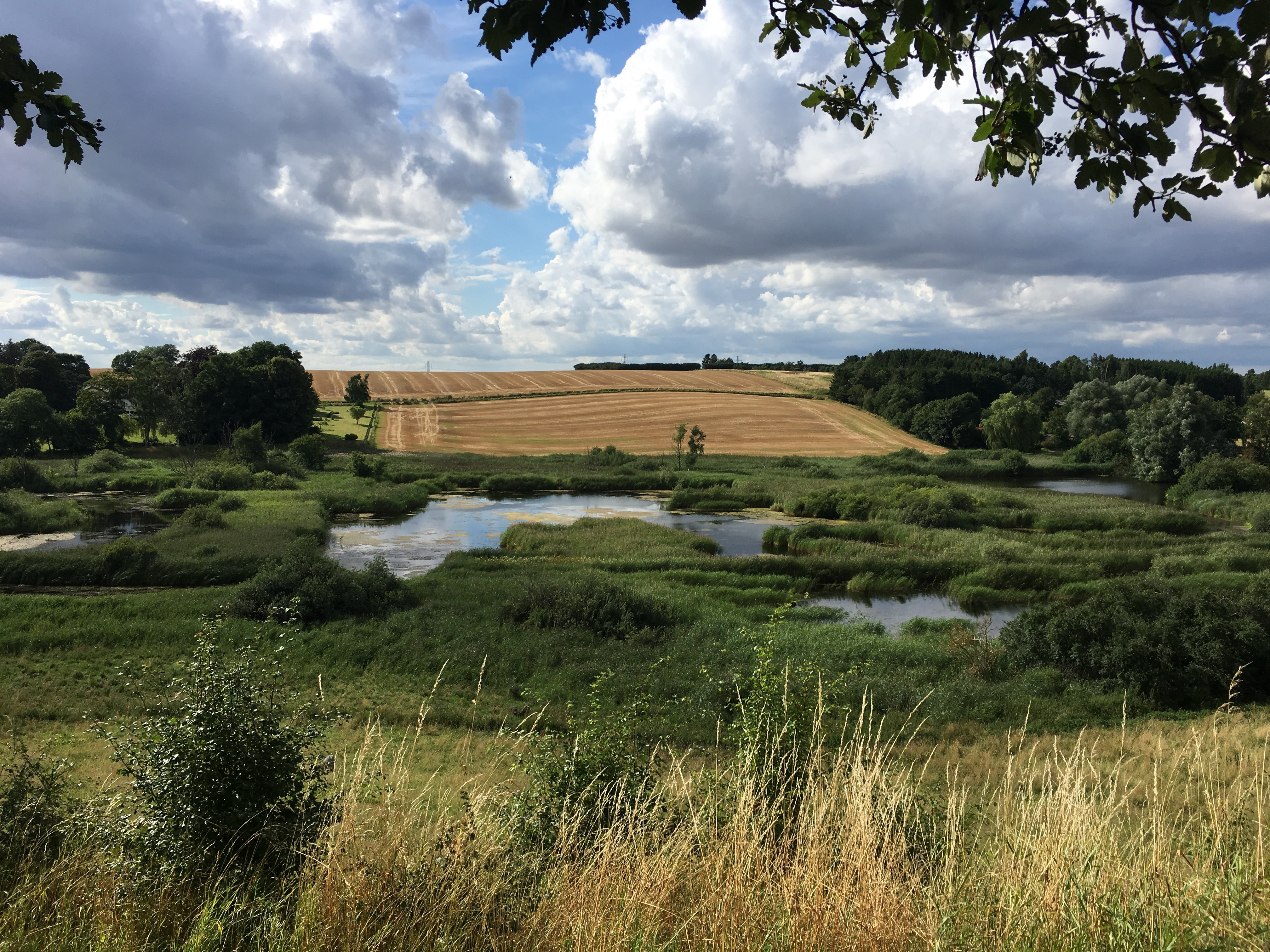 Brøns Mose, Sjælland